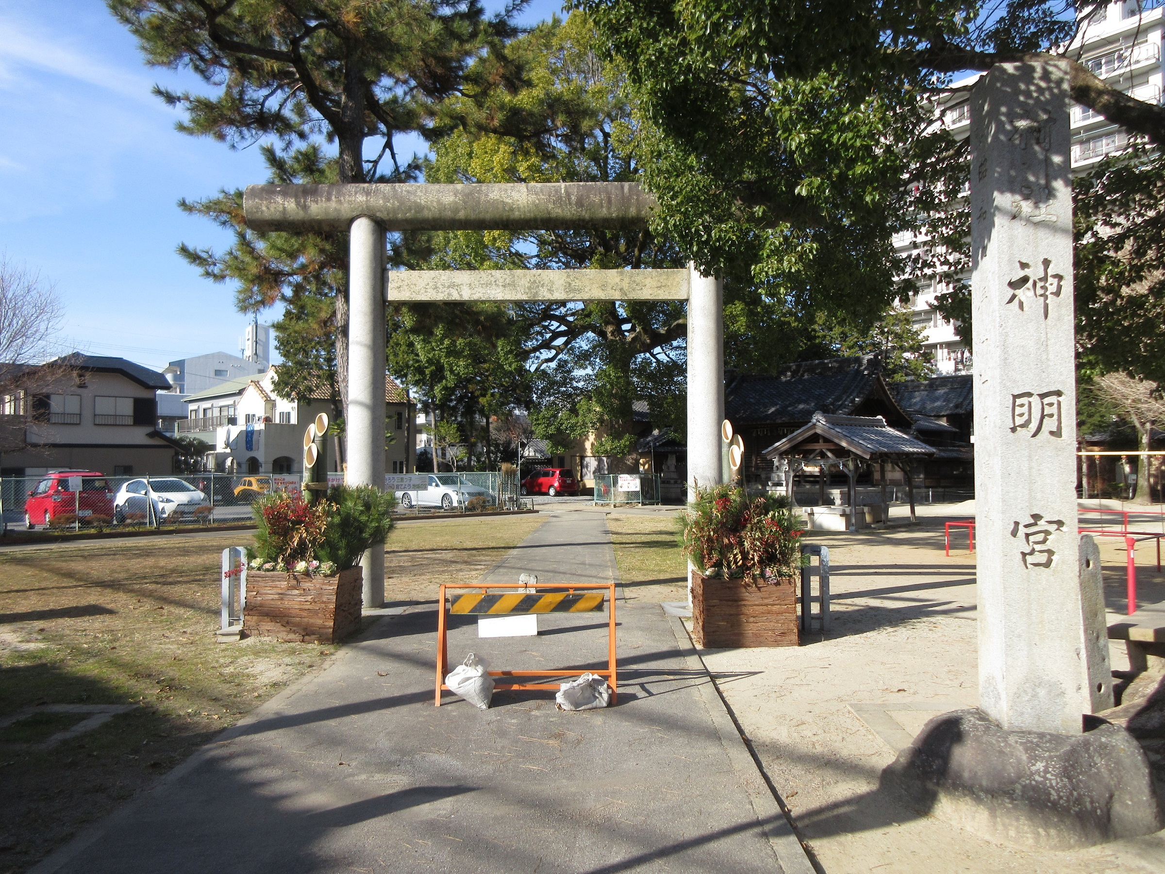 諸神神社（岡崎市明大寺町）